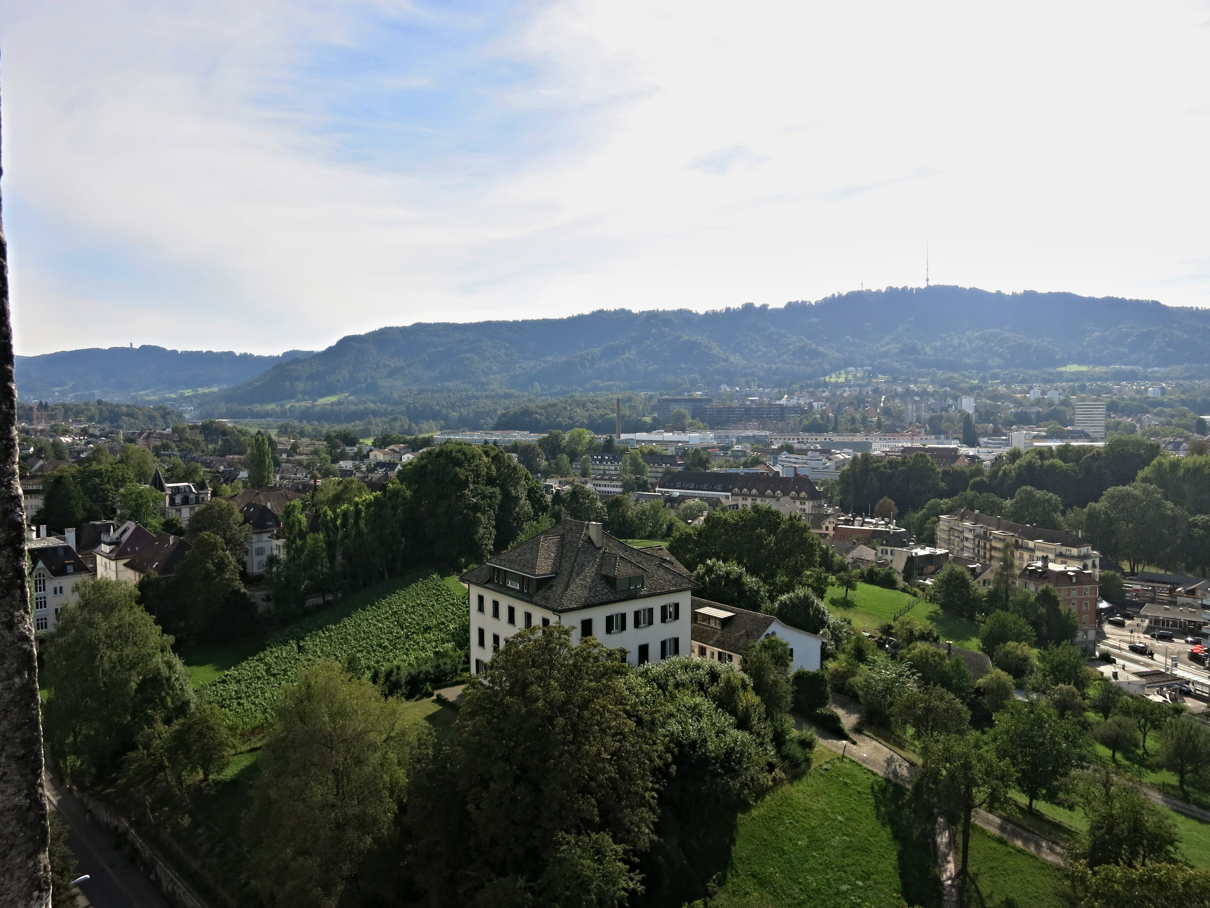 Aussicht von der Kirche Enge Richtung Südwesten